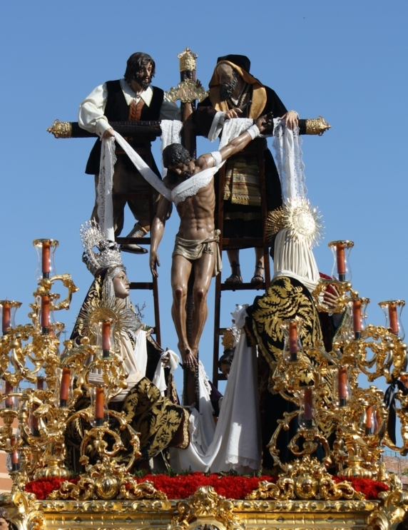 Santísimo Cristo del Descendimiento